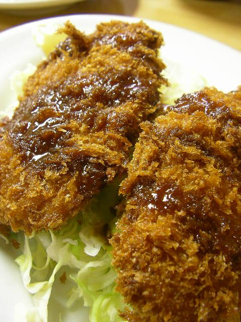 Menchi katsu(メンチカツ) (minced pork)